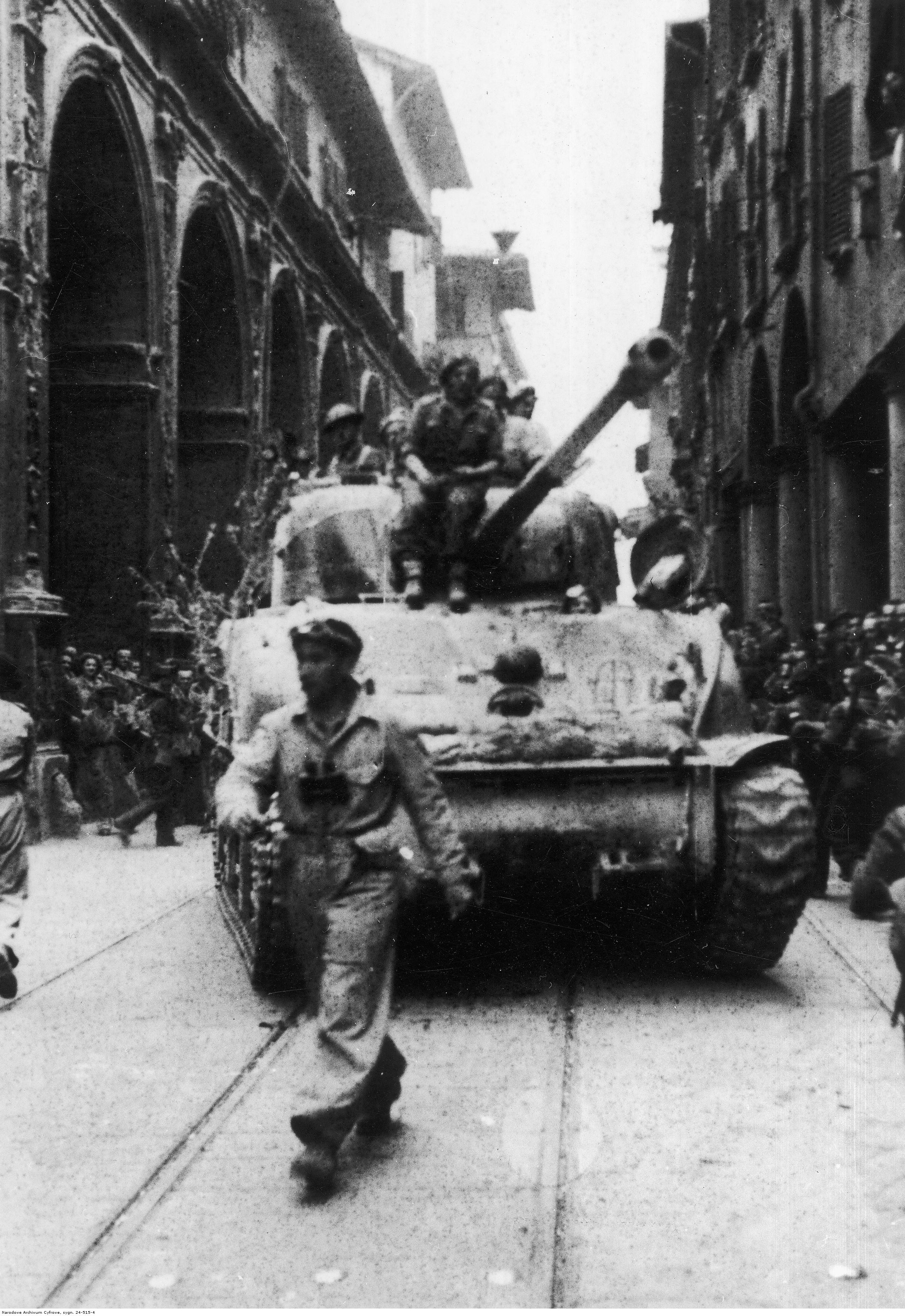 Wkroczenie polskich oddziałów 2 Korpusu Polskiego do Bolonii. Czołg M4 Sherman z 1 Pułku Ułanów Krechowieckich na ulicach miasta. Archiwum Fotograficzne Tadeusza Szumańskiego. Sygnatura: 24-515-4